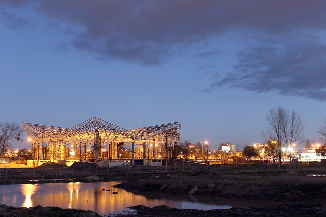 gimnasio regional en invierno